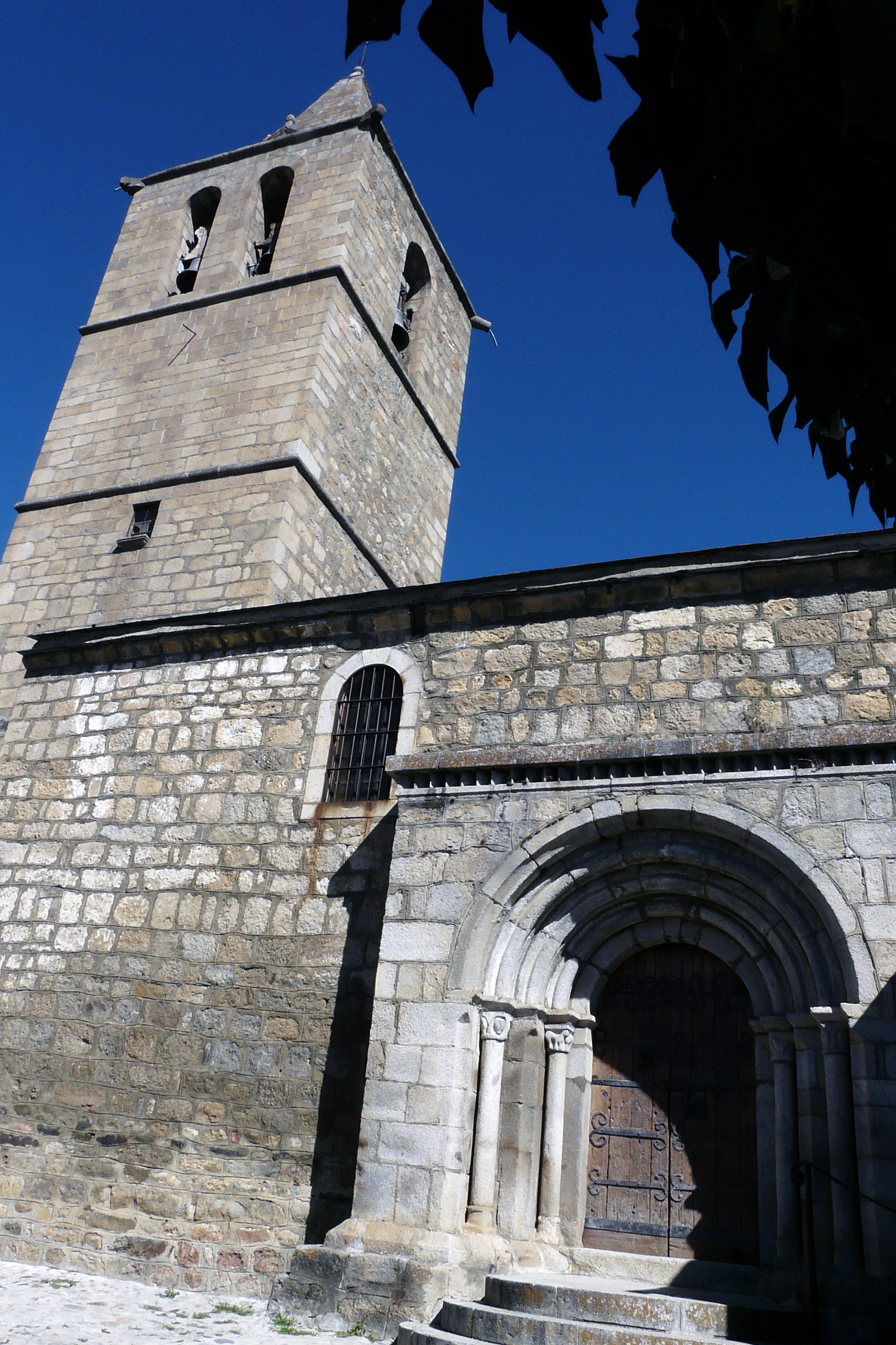 ESGLÉSIA ROMÀNICA